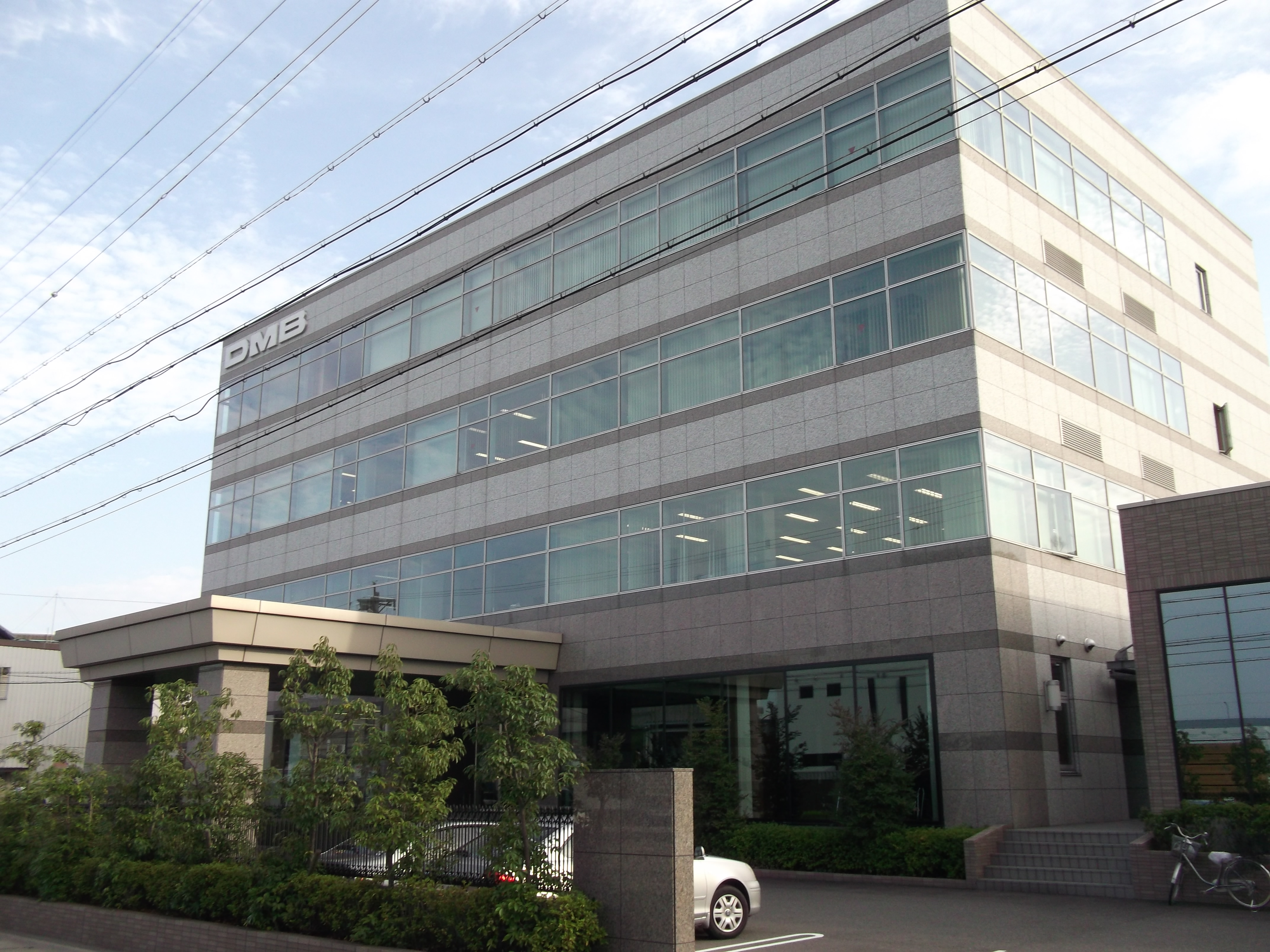 名古屋市港区の大日本木材防腐本社を北側公道西側より撮影